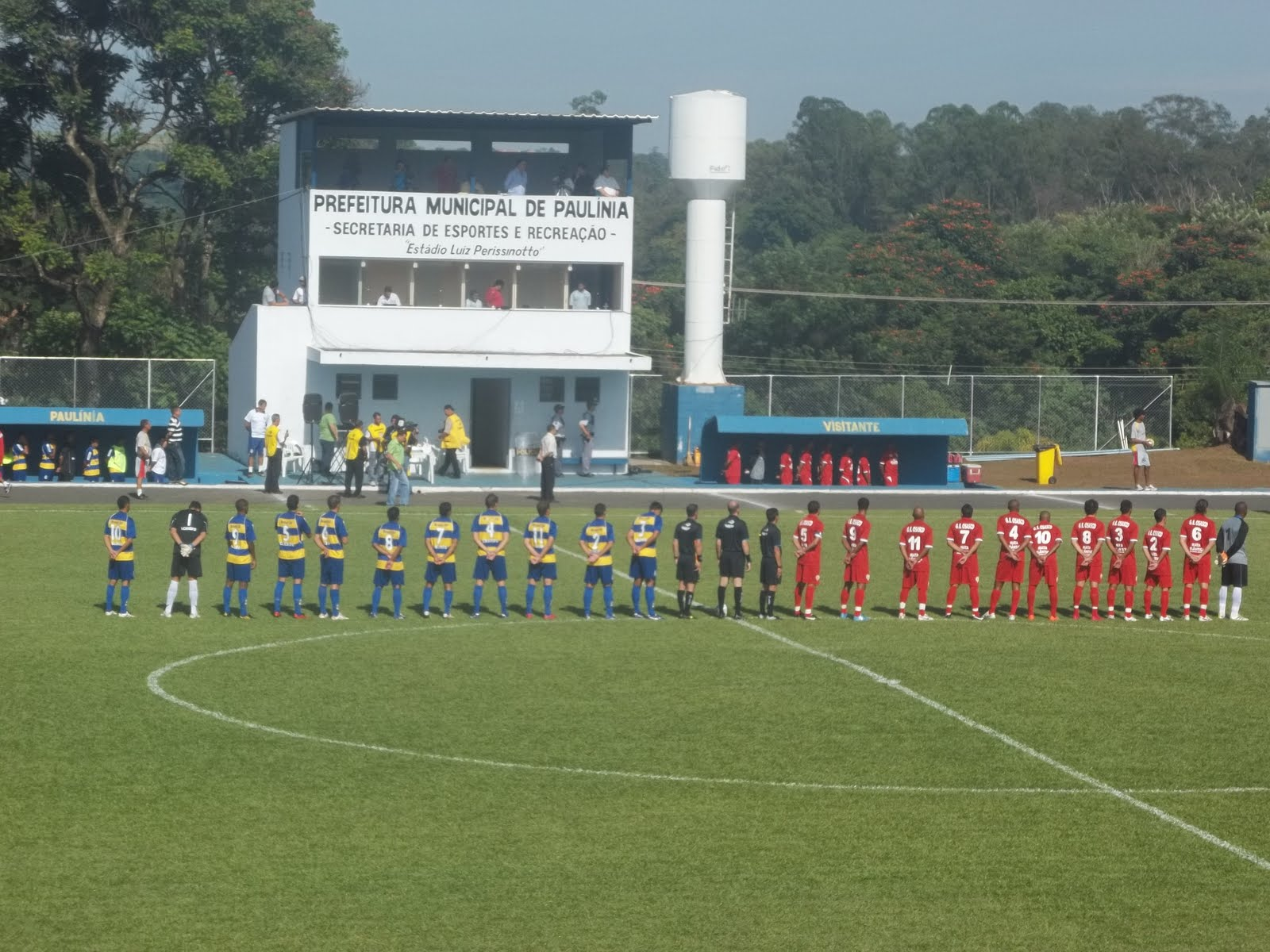 Elenco do Paulínia Futebol Clube e do Grêmio Esportivo Osasco antes da partida válida pelo Campeonato Paulista de Futebol de 2011 - Série A3, em Paulínia.